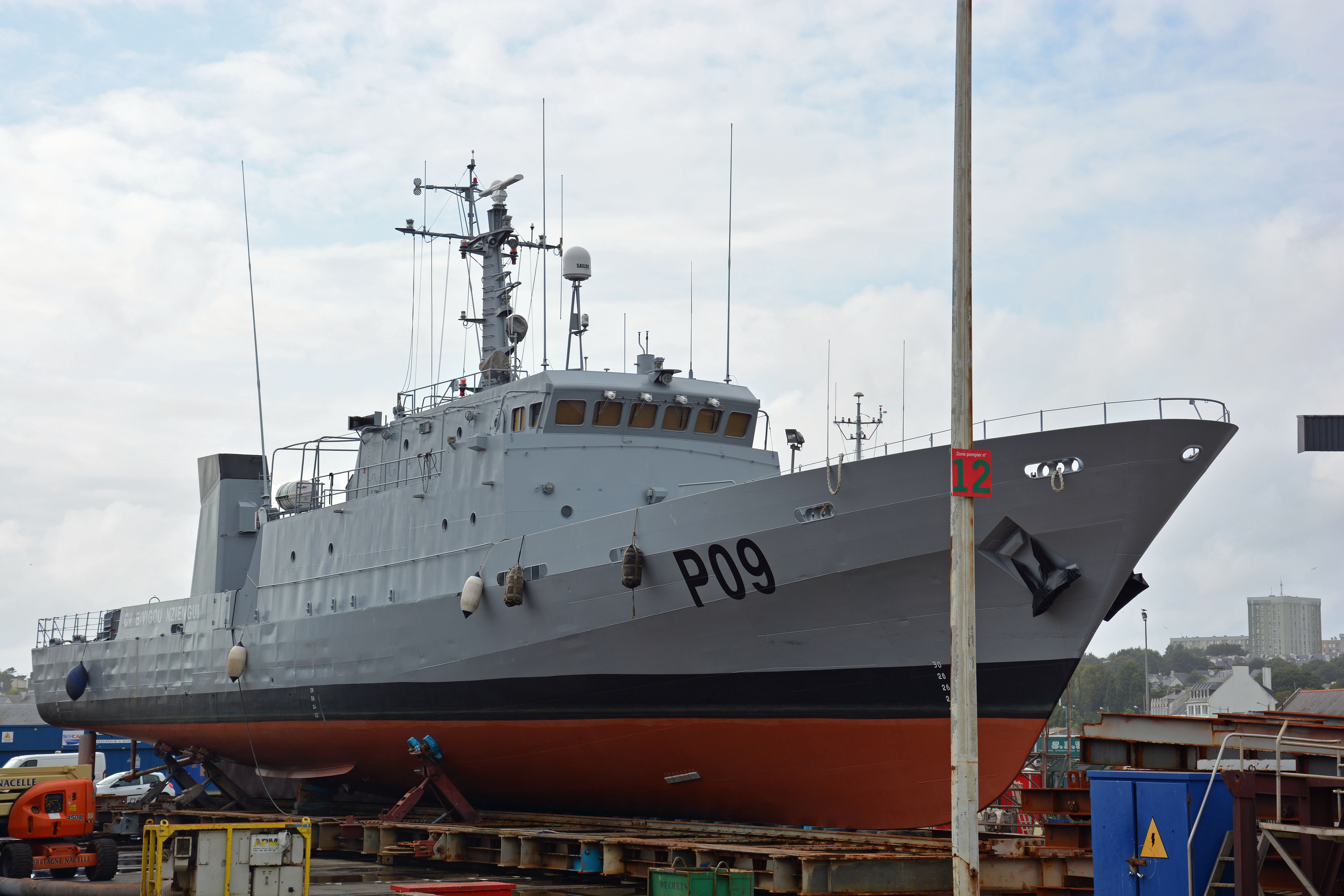 Le CV Bivigou Nziengui (P09) (ex Tapageuse (P691)) sur cale à Concarneau.